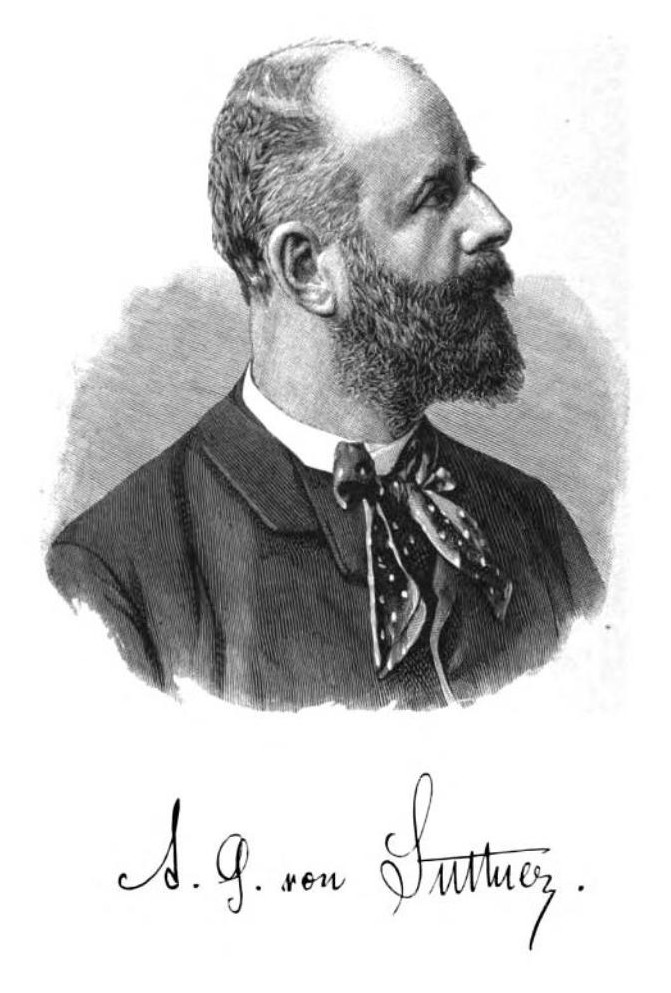 Arthur Gundaccar von Suttner. In: Die Gesellschaft, Volume 3, Part 2. Hrsg.: Michael Georg Conrad, Arthur Seidl. Leipzig: Wilhelm Friedrich 1887